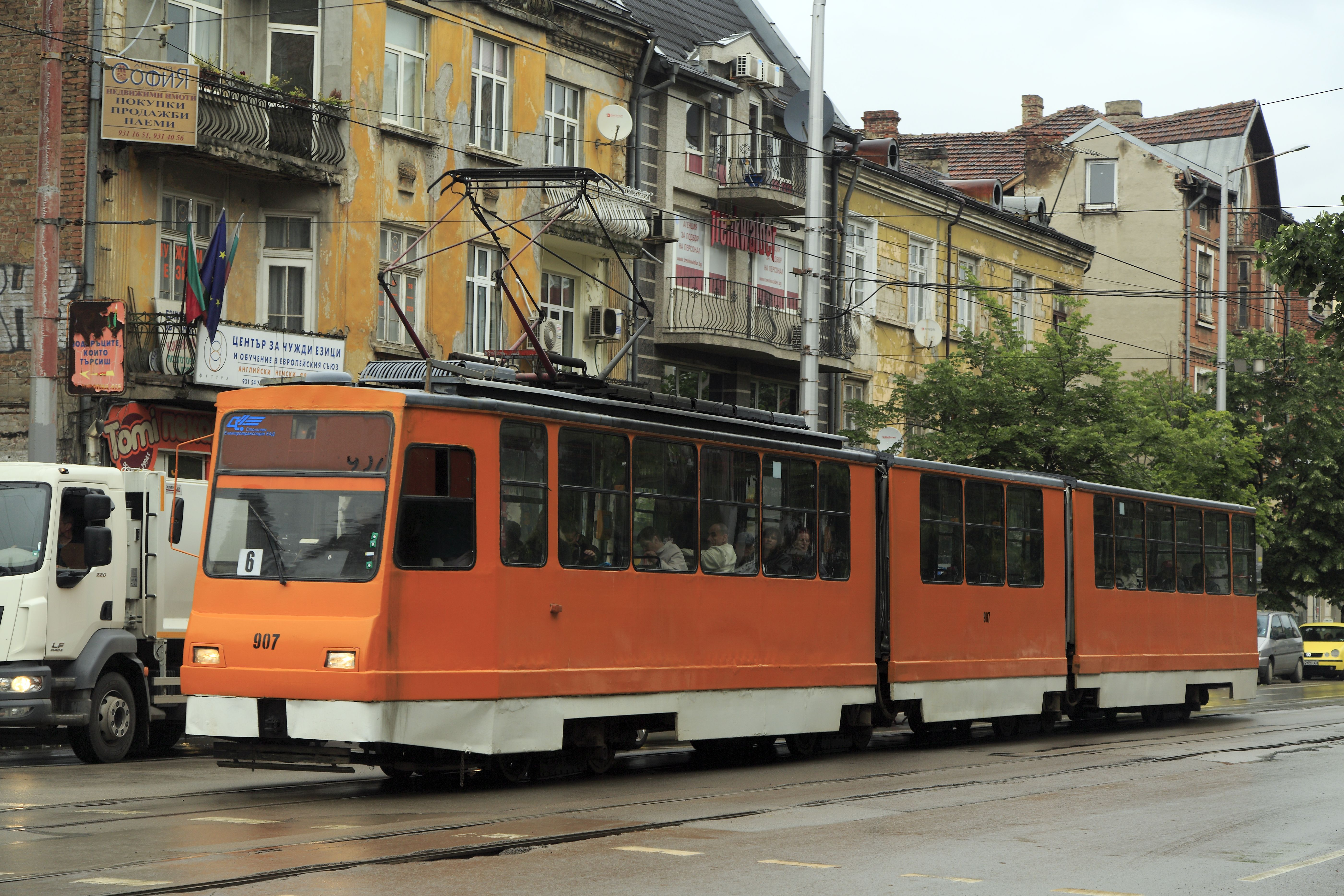 Zug der Linie 6 zum Wohngebiet Nadježda, nichtmodernisierter Wagen der Reihe T8M-900M.